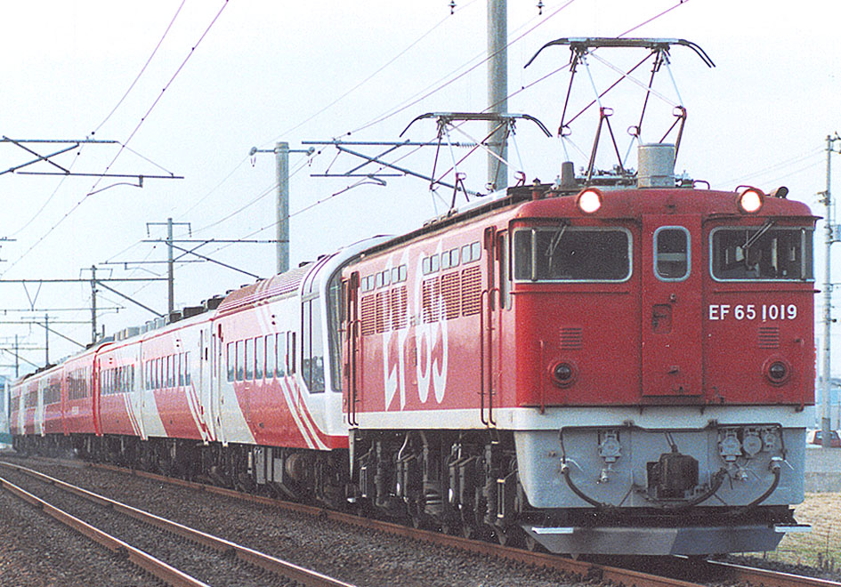 EF65 1019けん引スーパーエクスプレスレインボー